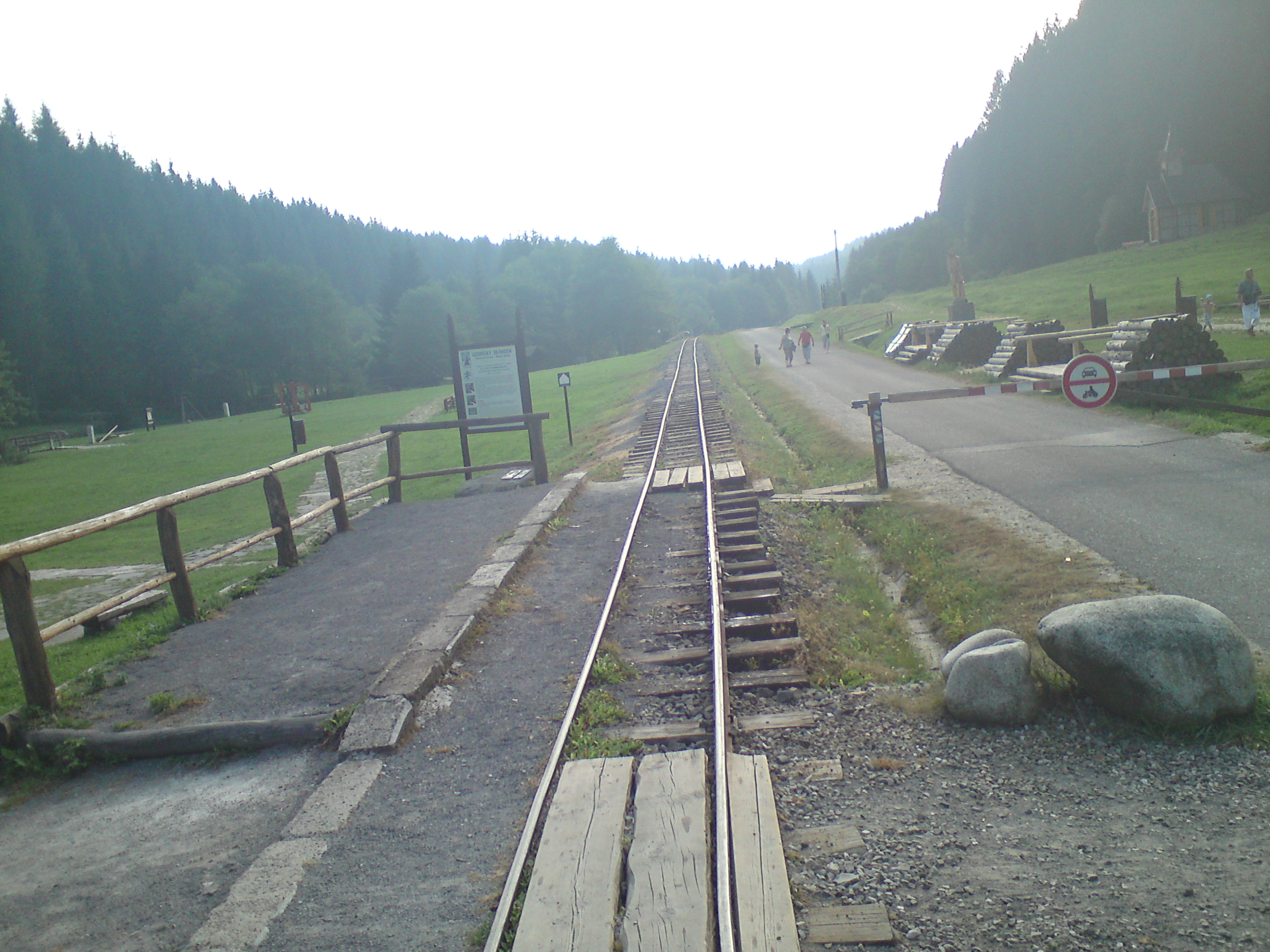 Konečná železnice